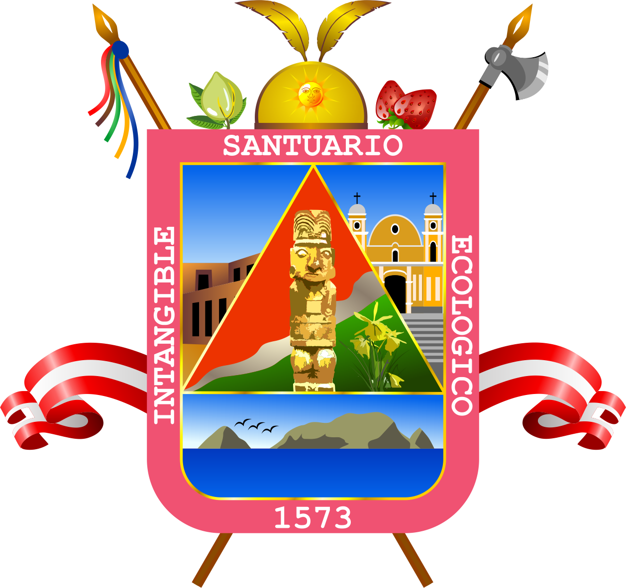 Escudo del Distrito de Pachacámac - Provincia de Lima - Región Lima